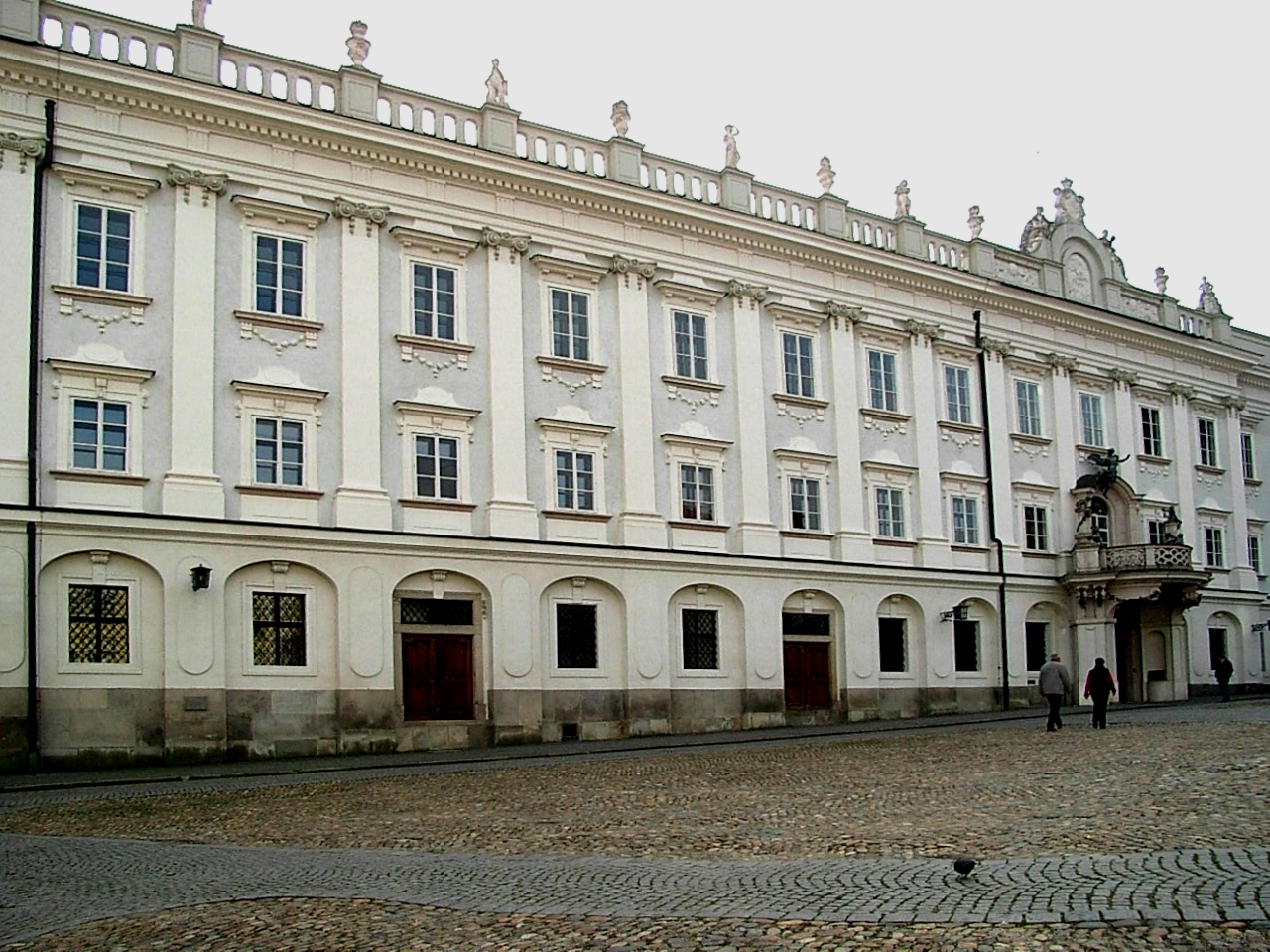 Beschreibung: Neue bischöfliche Residenz Passau Quelle: Bild selbst erstellt Datum: 8. November 2006 Autor: Konrad Lackerbeck